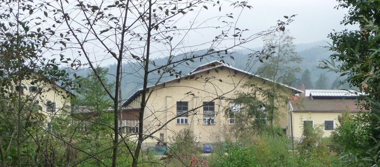 Glashuette Poschinger